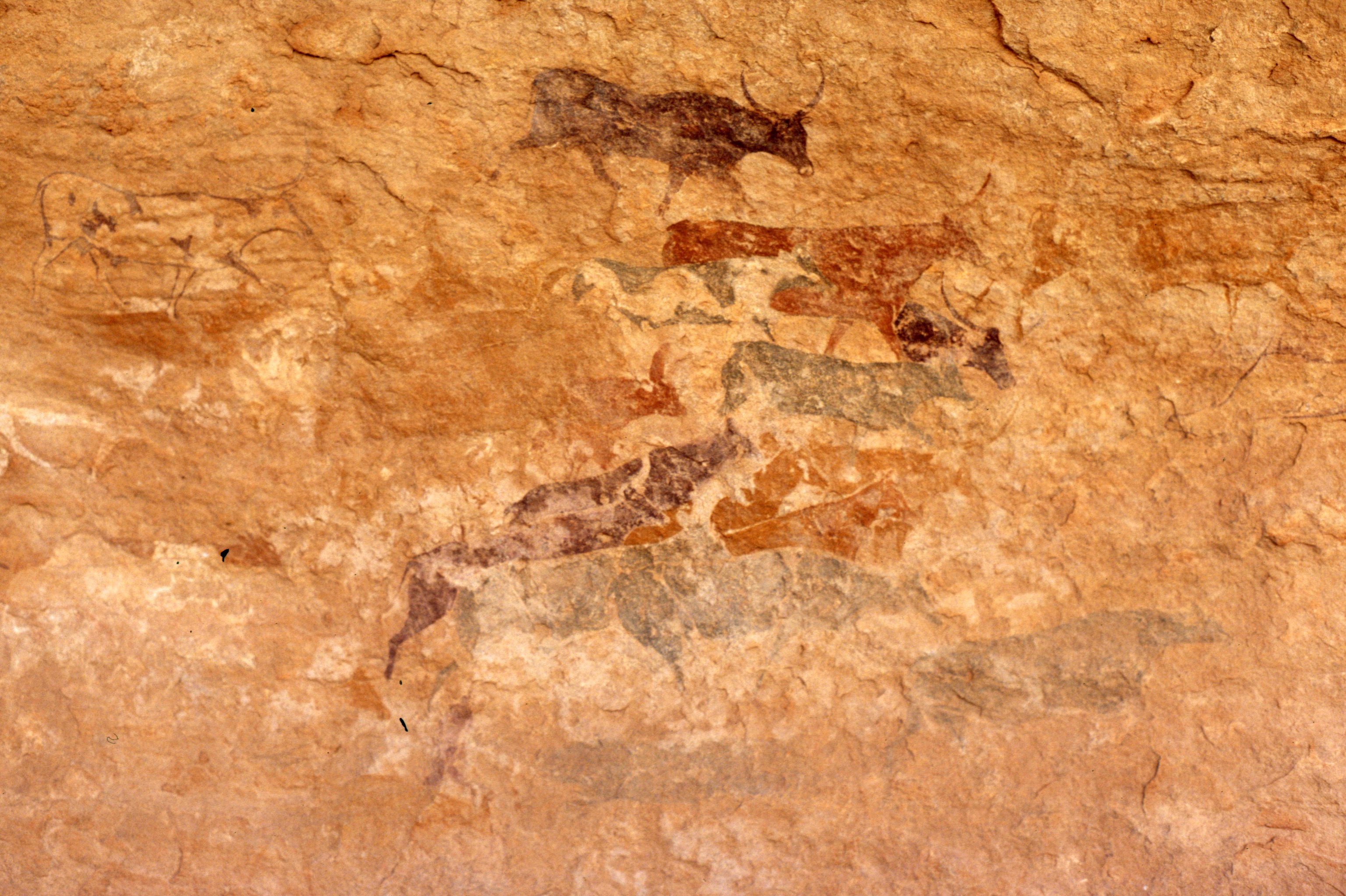 Algerien_5_0038